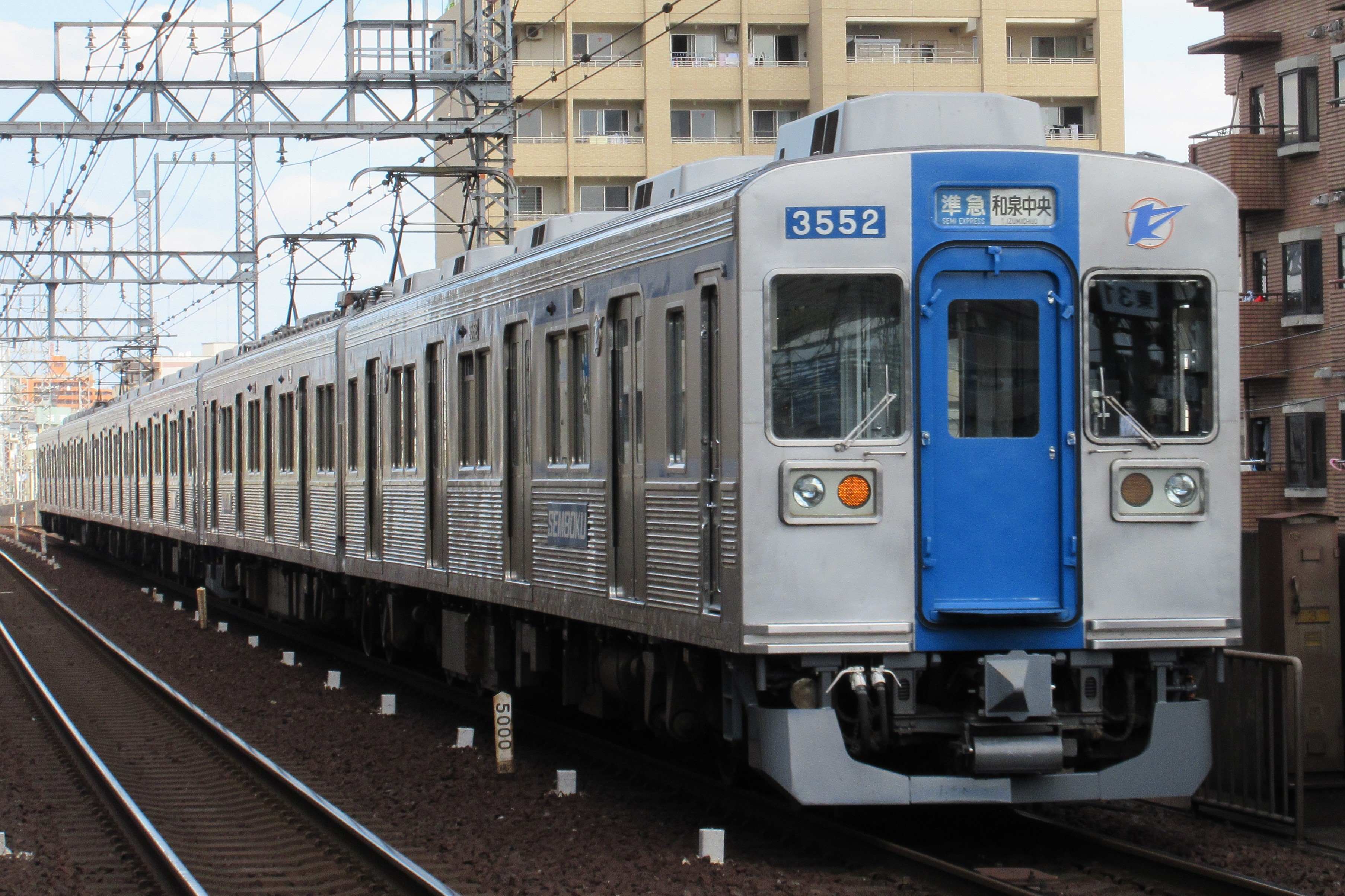 泉北高速鉄道3552 (天下茶屋駅にて)